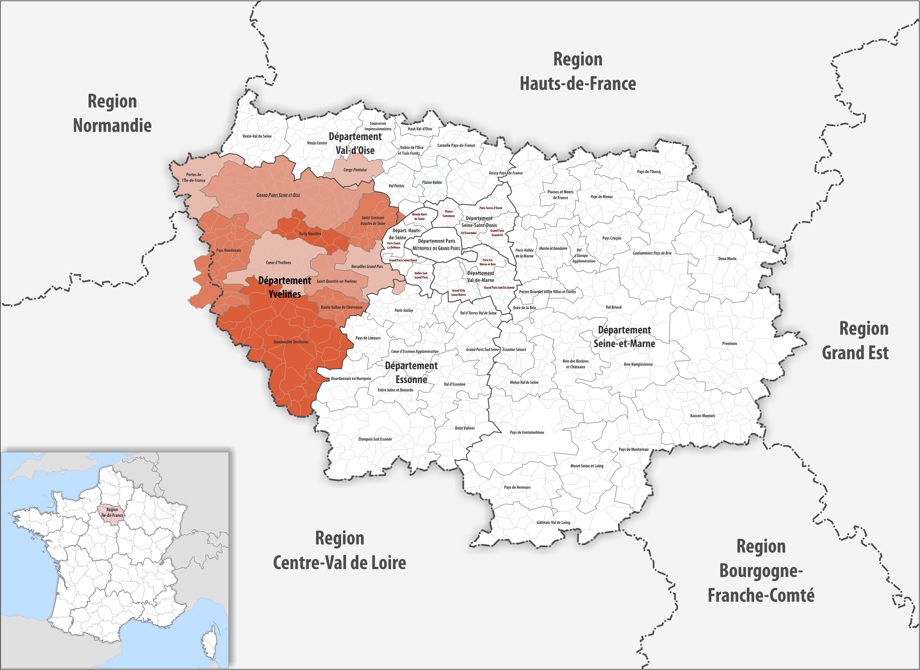 Gemeindeverbände im Département Yvelines